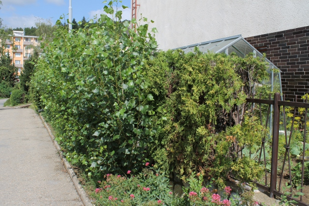 živý plot z topolu, Brno Komín, červen 2012